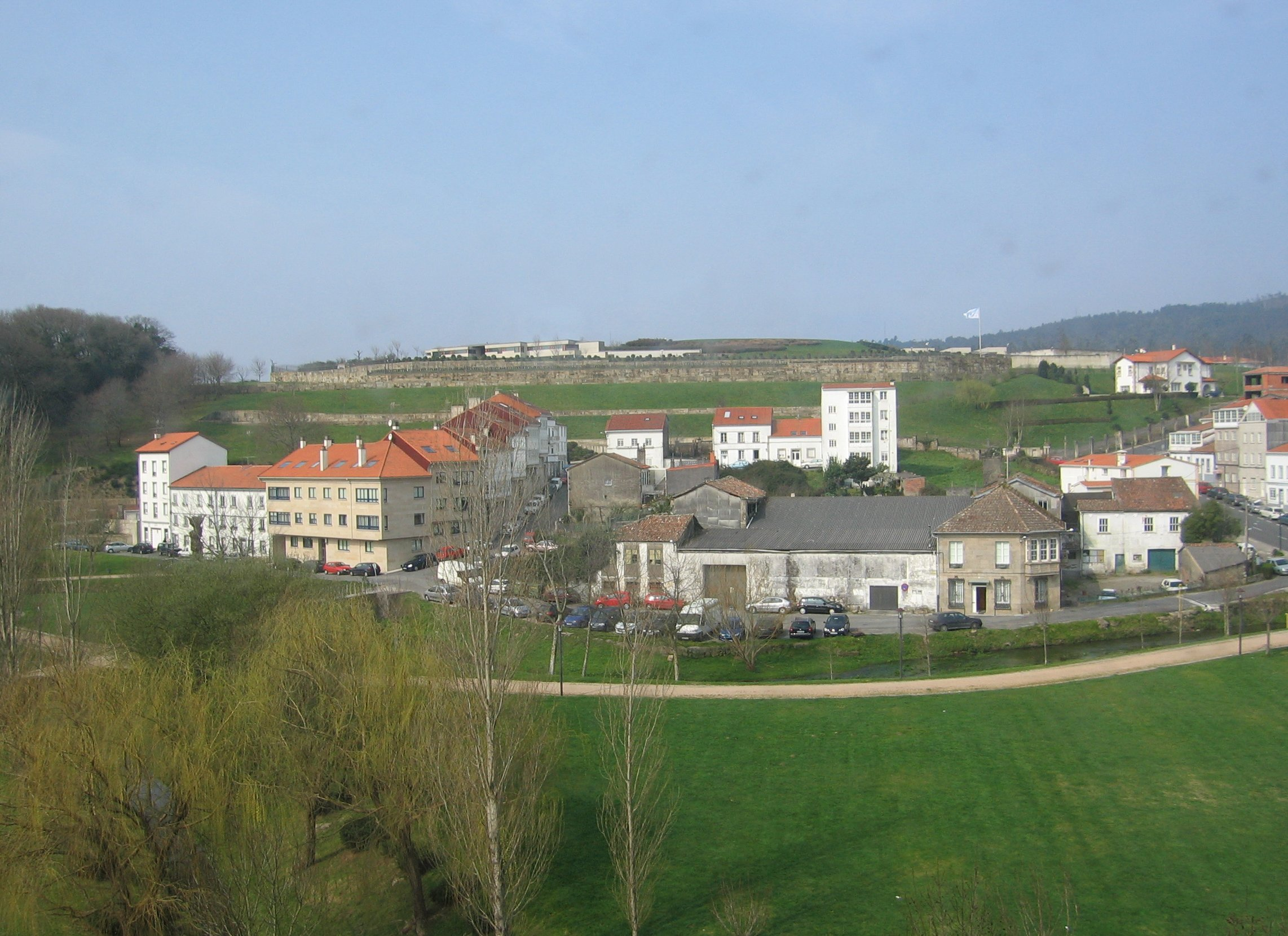 Residencia oficial do Presidente da Xunta de Galicia, no lugar de Casas Novas, en Compostela